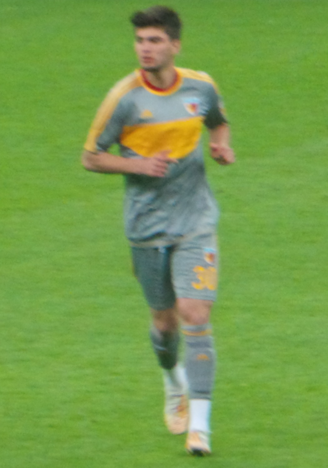 Okay Yokuşlu Kayseri